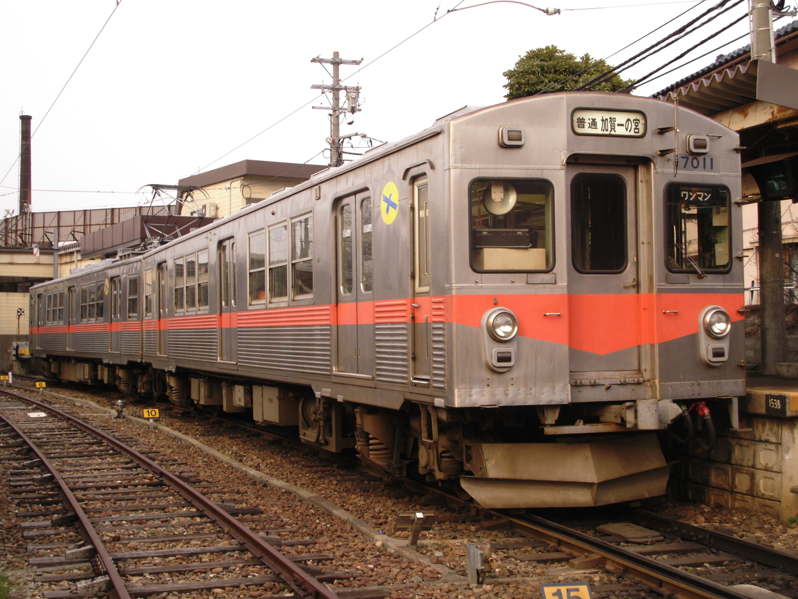 北陸鉄道7000系電車野町駅で（Rsa）が撮影